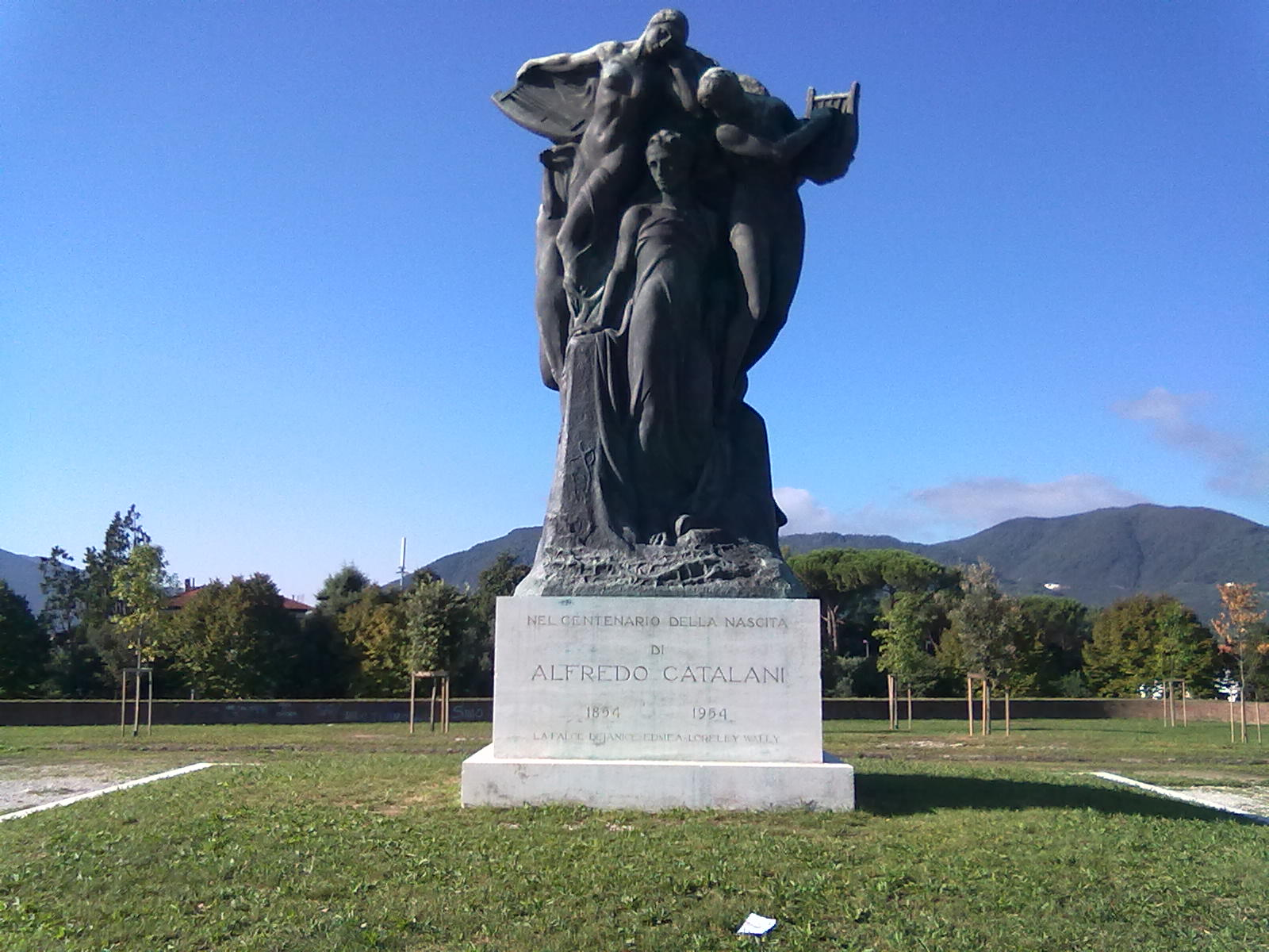 55100 Lucca, Province of Lucca, Italy